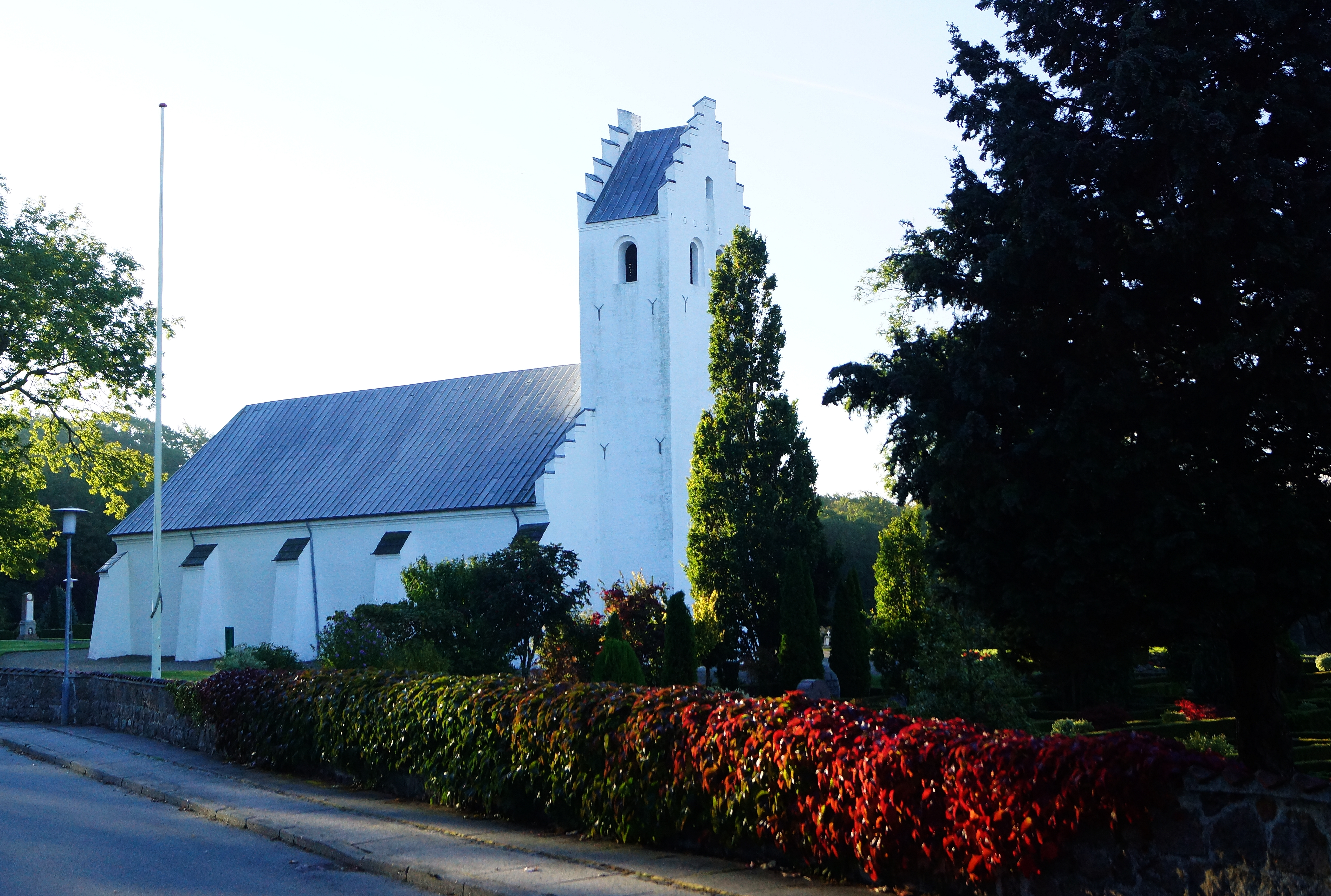 Bregnet Kirke